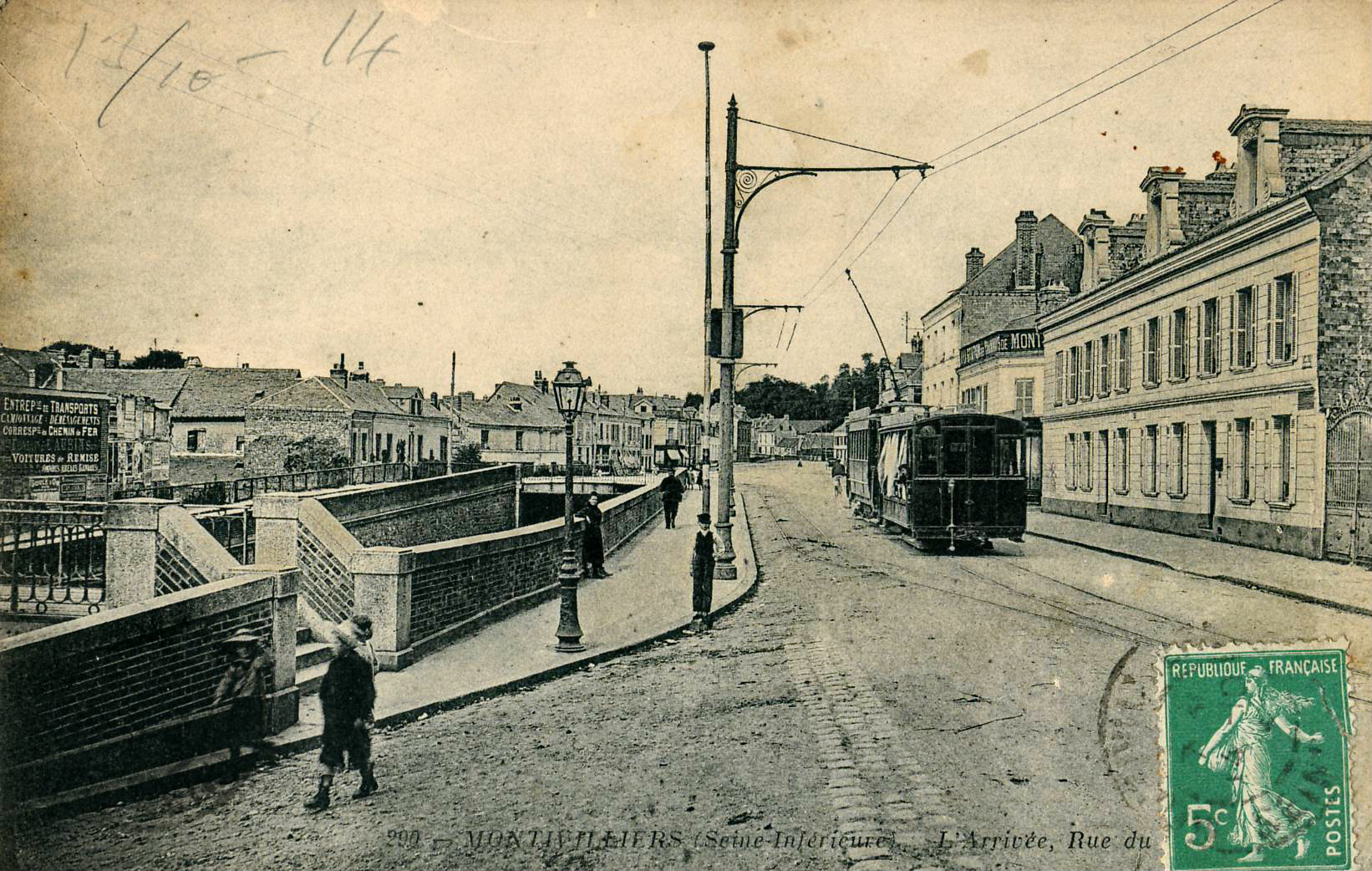 Carte postale ancienne éditée par ND, n°290Montivilliers - L'arrivée, rue du Havre.